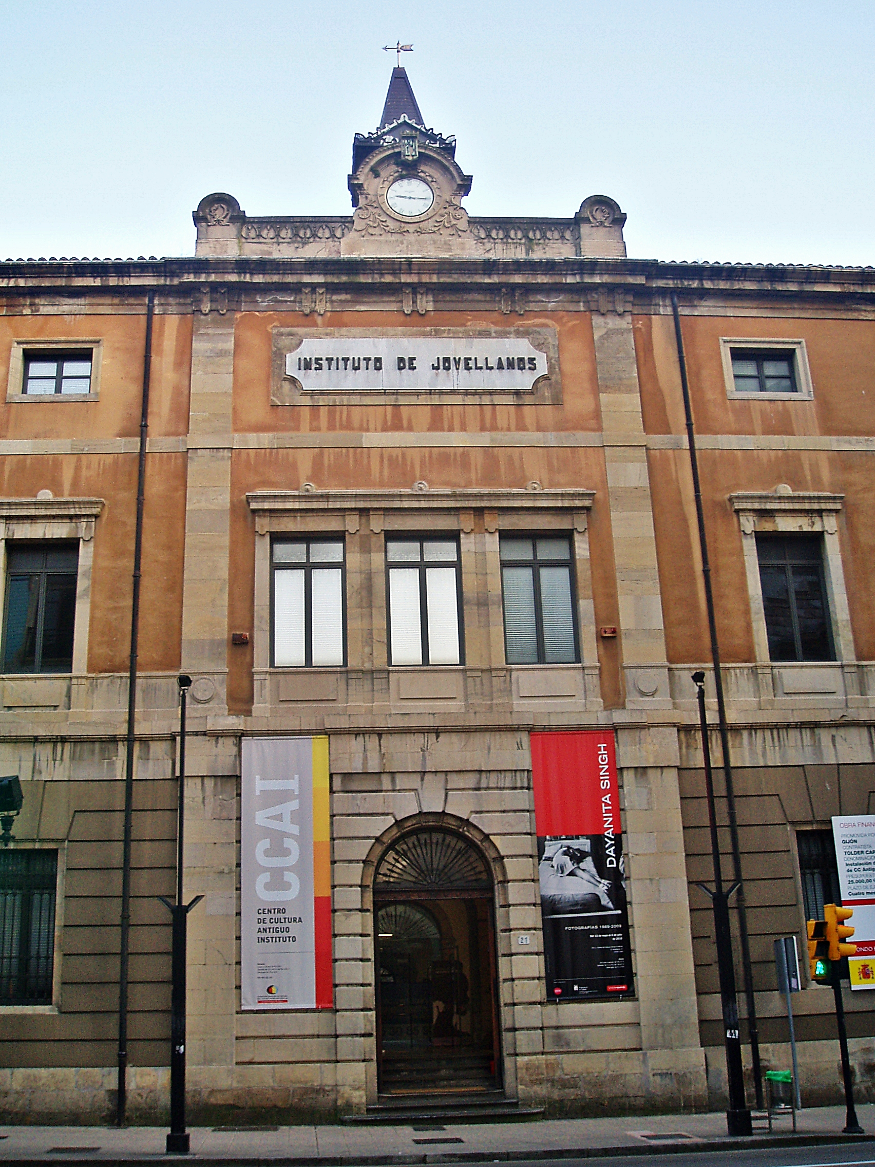 Fachada principal